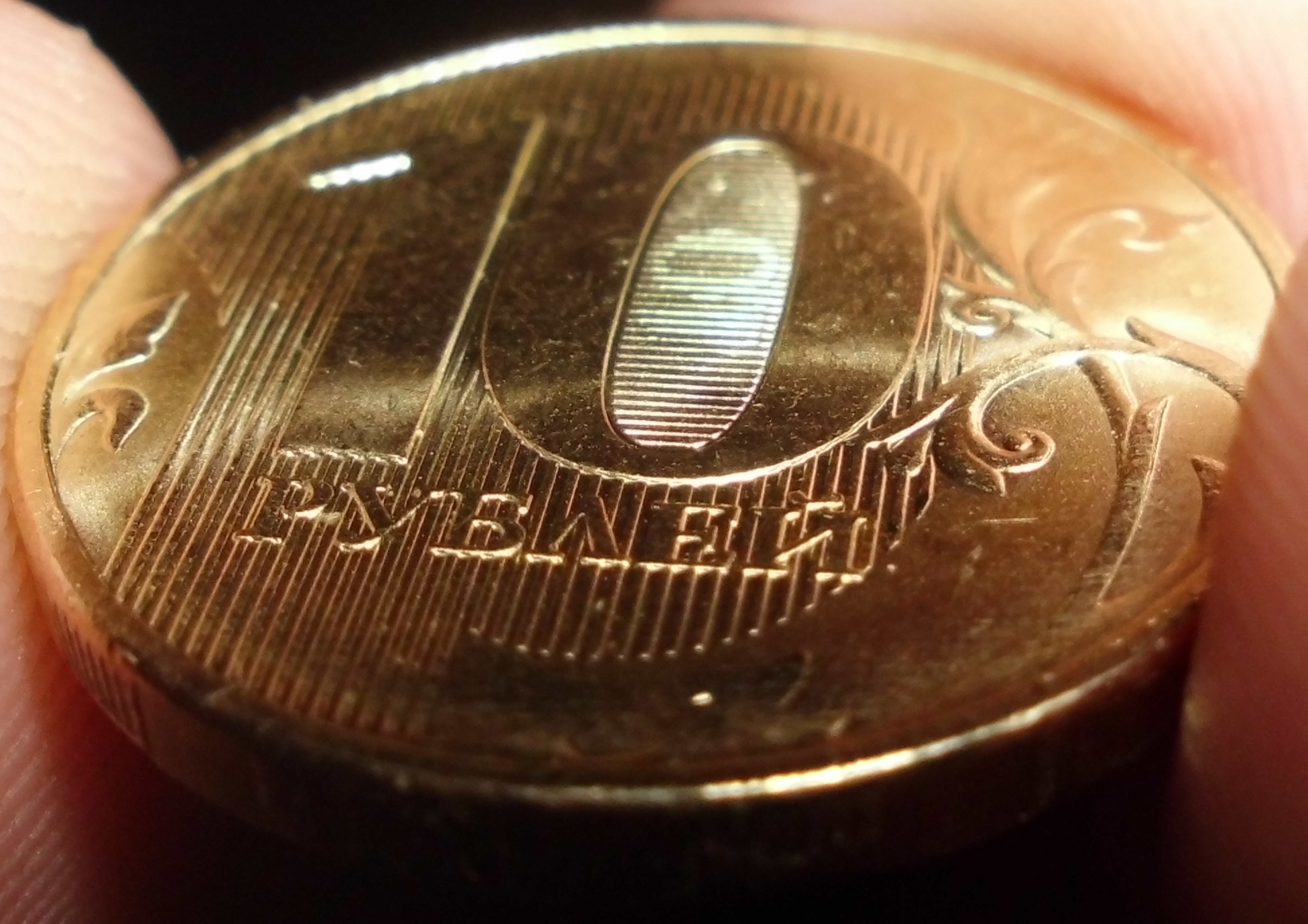 10-рублёвая монета. Реверс. 2017 г. Россия. При осмотре под углом снизу видна цифра "10" в рифлёном поле внутри цифры "0". This work is not an object of copyright according to article 1259 of Book IV of the Civil Code of the Russian Federation No. 230-FZ of December 18, 2006. Shall not be objects of copyright: official documents of state government agencies and local government agencies of municipal formations, including laws, other legal texts, judicial decisions, other materials of legislative, administrative and judicial character, official documents of international organizations, as well as their official translations; state symbols and signs (flags, emblems, orders, any forms of money, and the like), as well as symbols and signs of municipal formations; works of folk art (folklore), which don't have specific authors; news reports on events and facts, which have a purely informational character (daily news reports, television programs, transportation schedules, and the like). Comment – This license tag is also applicable to official documents, state symbols and signs of the Russian Soviet Federative Socialist Republic and the Union of Soviet Socialist Republics (union level[1]). Warning – This license tag is not applicable to drafts of official documents, proposed official symbols and signs, which can be copyrighted. Warning – This Russian official document, state symbol or sign (postage stamps, coins and banknotes mainly) may incorporate one or more works that can be copyrightable if separated from this document, symbol or sign. In such a case, this work is not an object of copyright if reused in its entirety but, at the same time, extracting specific portions from this work could constitute copyright infringement. For example, the denomination and country name must be preserved on postage stamps. ↑ Official documents, state symbols and signs of 14 other Soviet Republics are the subject of law of their legal successors. See respective license tags.